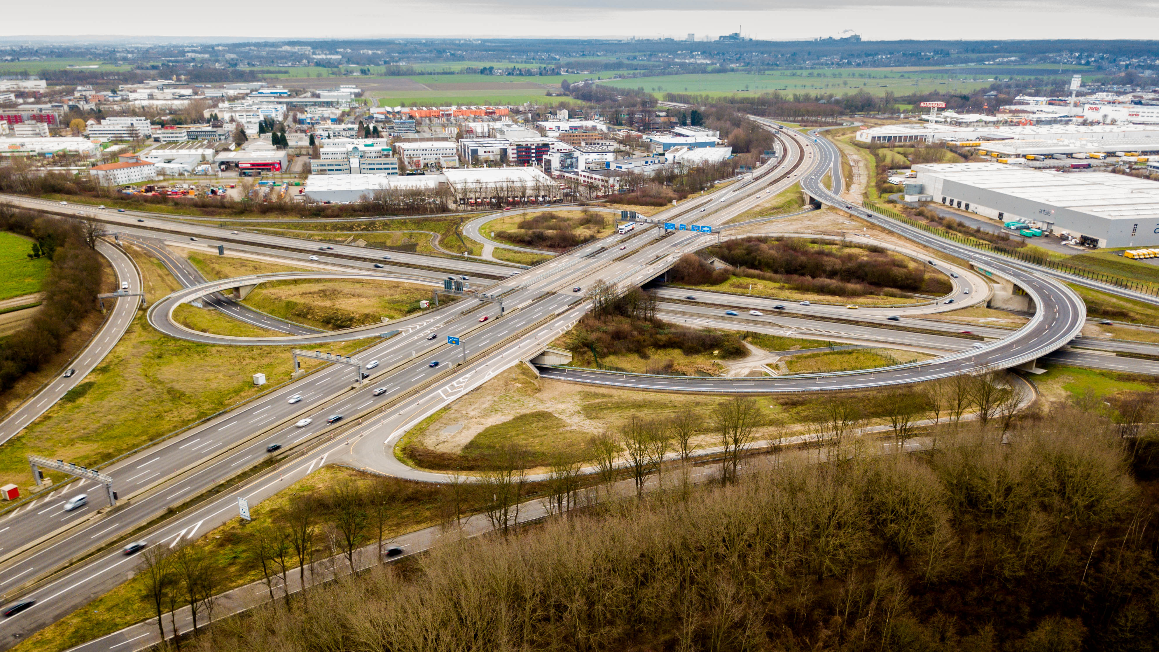 Das Autobahnkreuz verbindet A1 und A4. Aufnahme von Nordwest Richtung Südost.